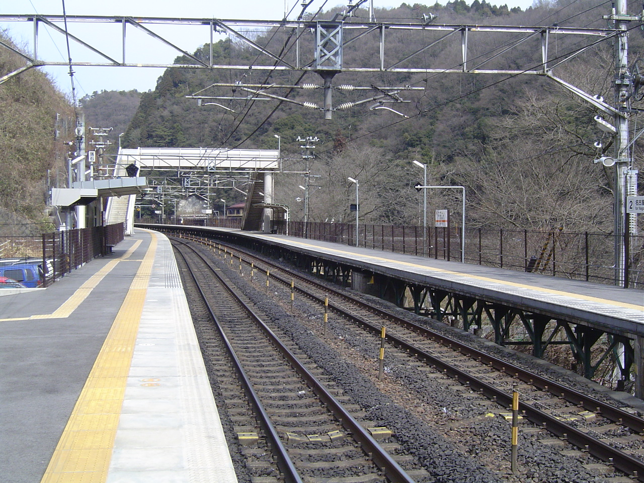 JR中央本線古虎渓駅構内